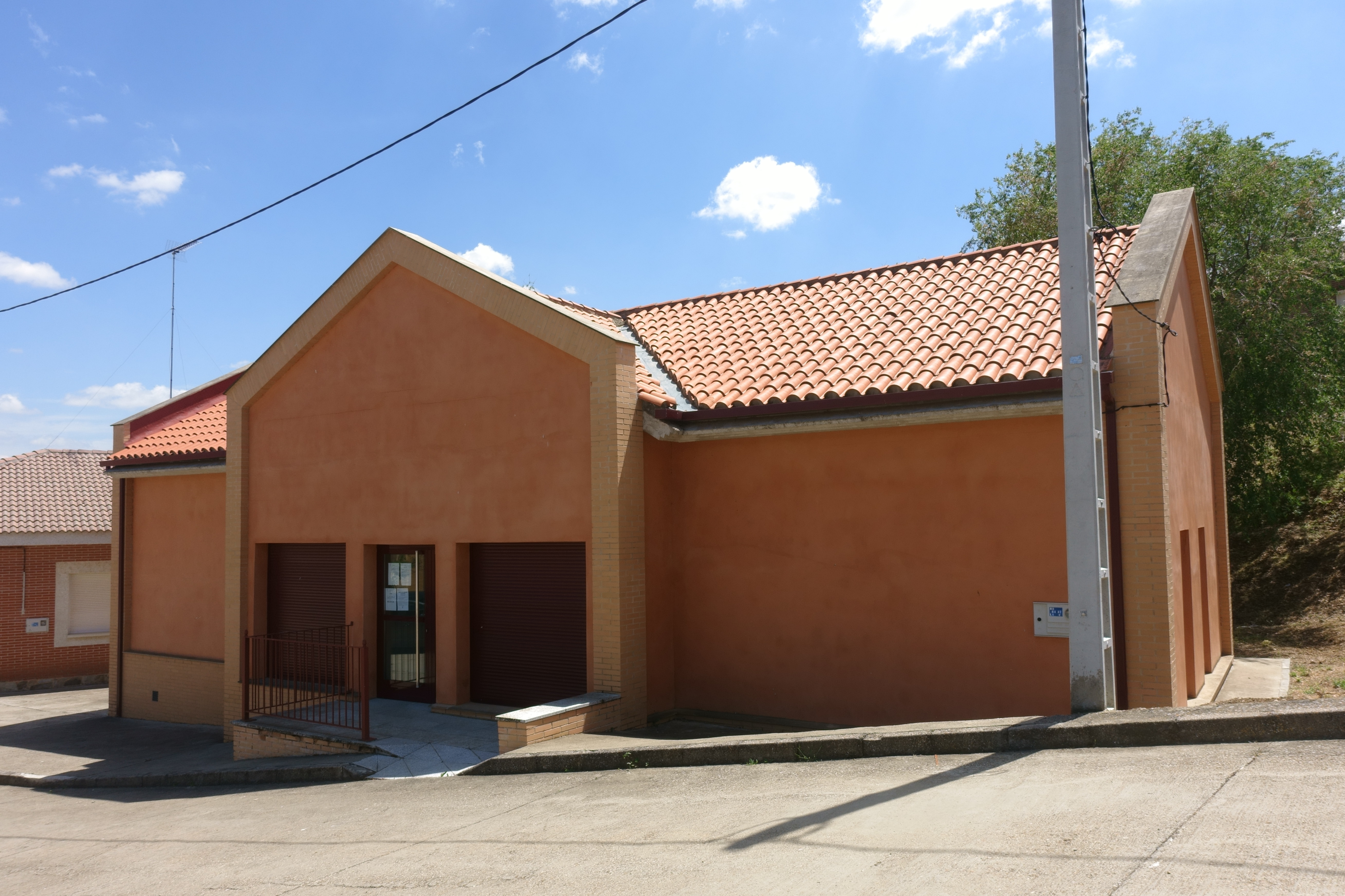 Casa consistorial de Villamol (León, España).